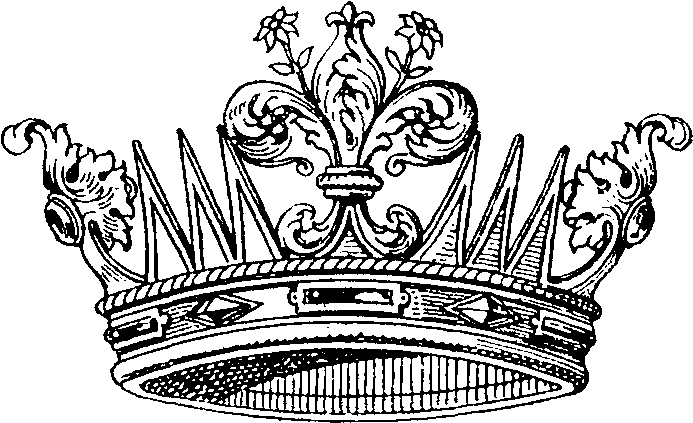 "Zu den kronen Italiens gehört auch die der Grossherzöge von Toscana (Fig. 36), wie sie bereits von den Mediceern, den Herzogen von Florenz, geführt wurde. Sie ist eine Zackenkrone, die vorne in der Mitte mit der florentinischen Wappenfigur, der Lilie, geschmückt ist. In alten Darstellungen sind die seitlichen Laubblätter nicht zu sehen."